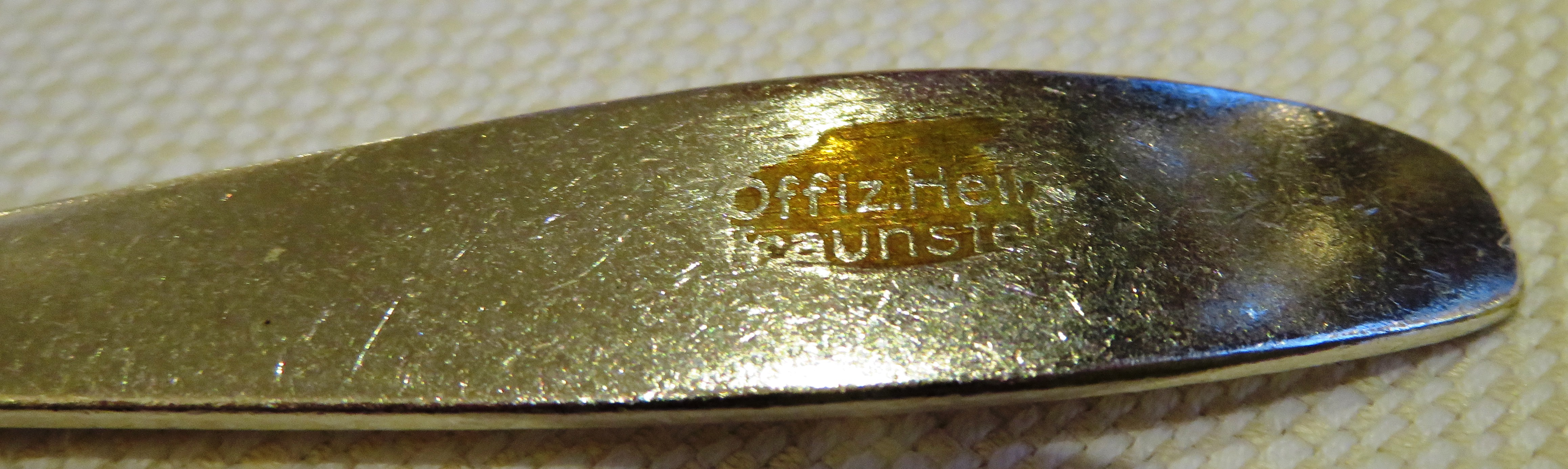 Silberbesteck mit Gravur